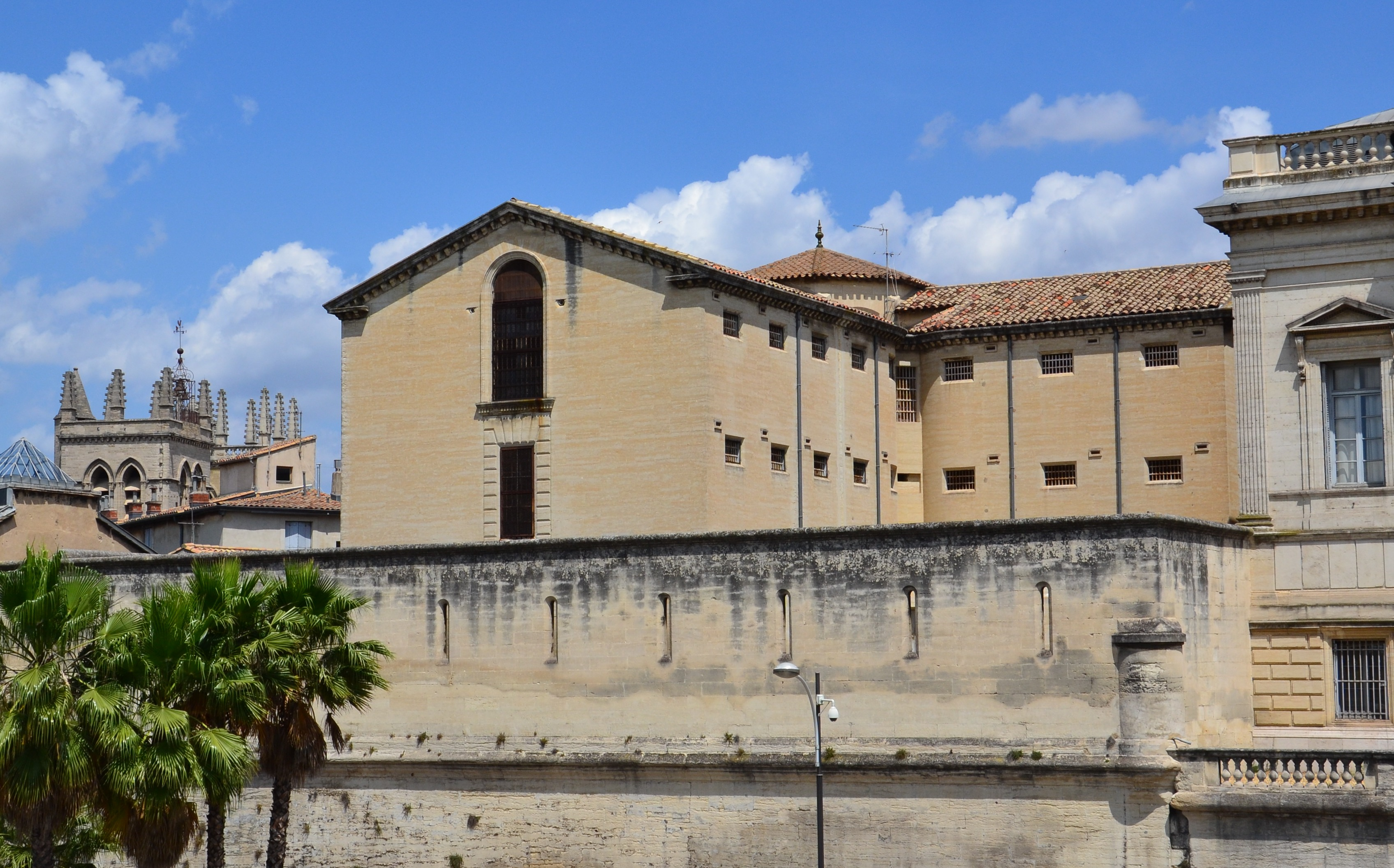 Ancienne prison de Montpellier.